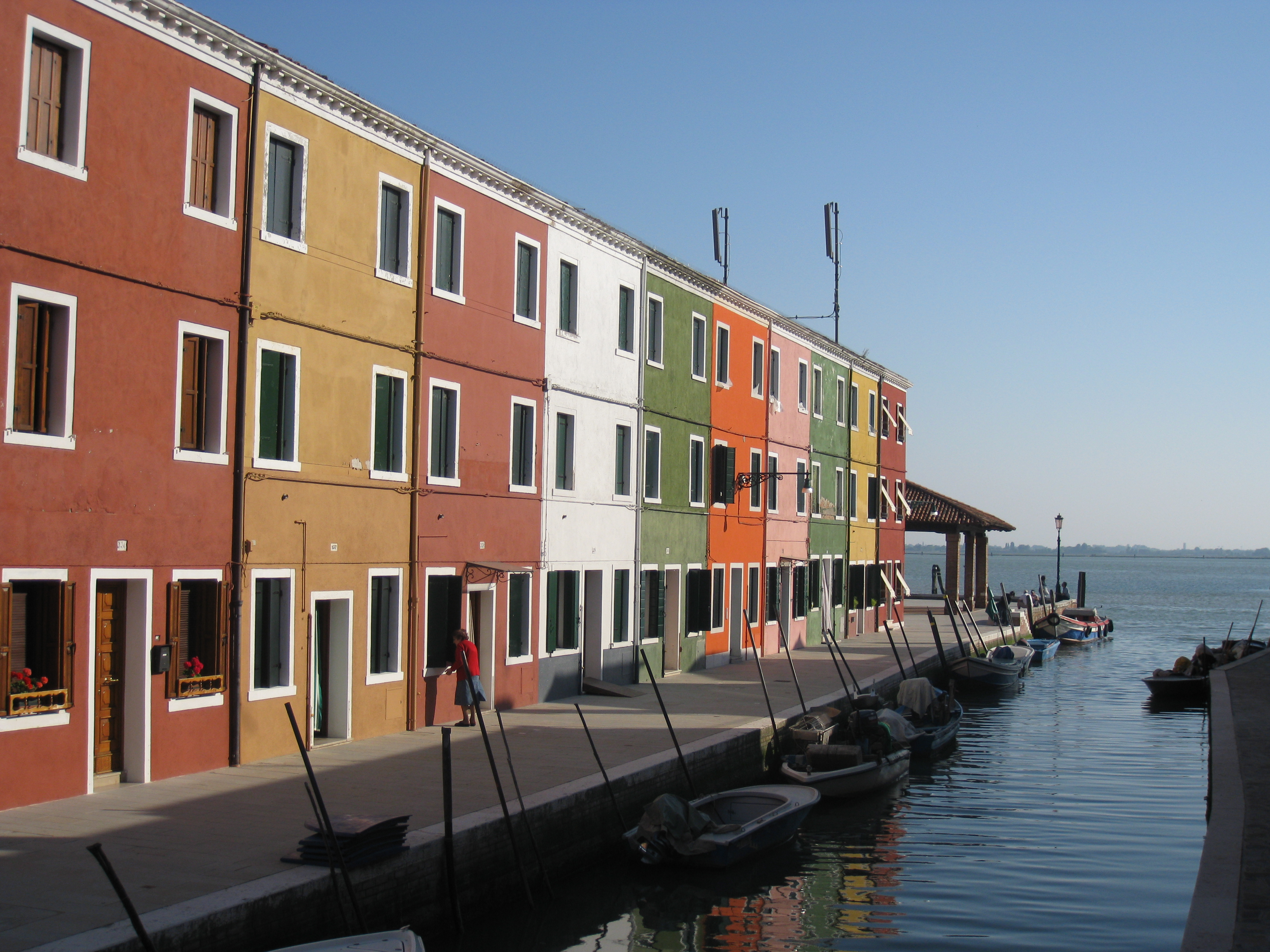 Burano בוראנו